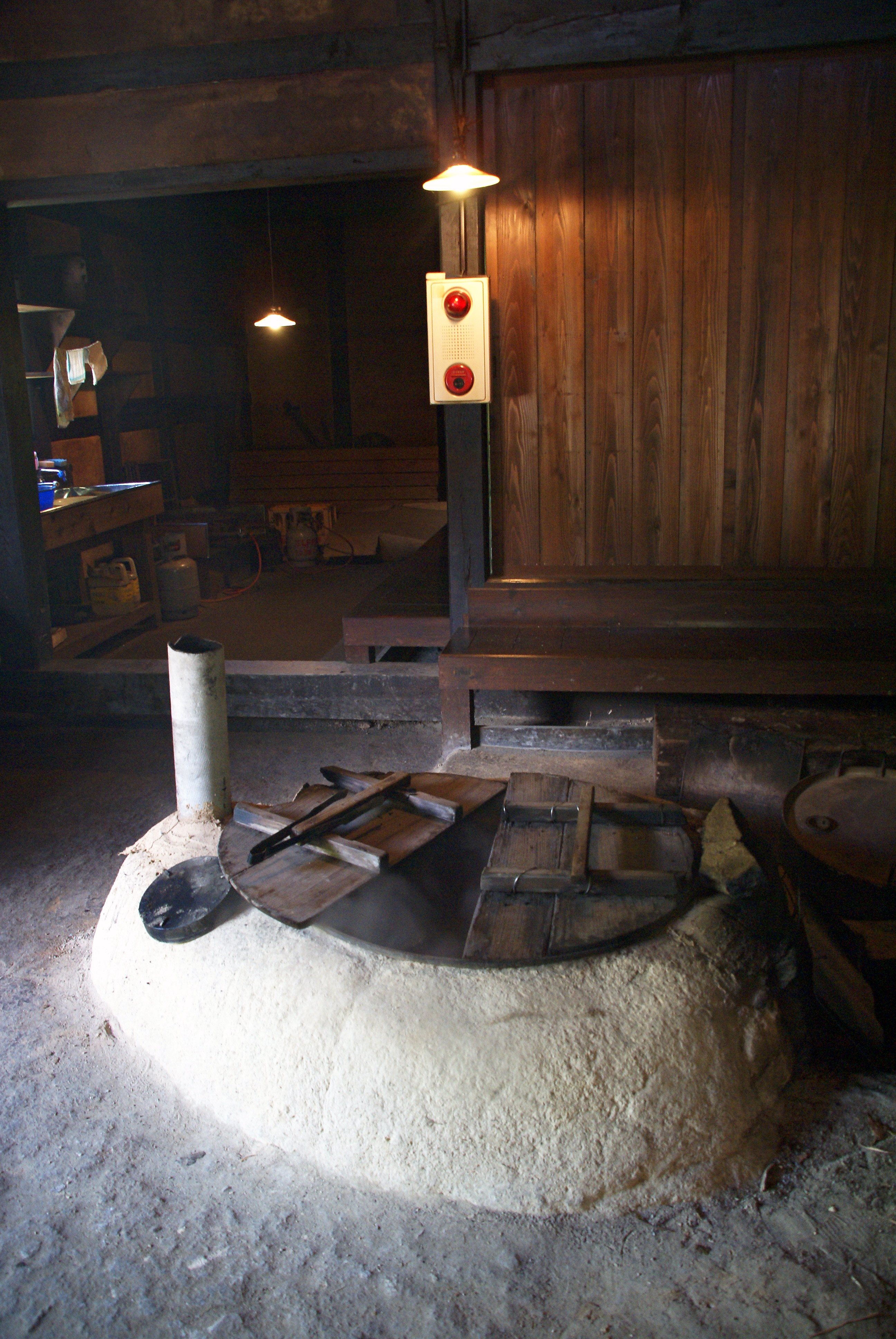 Tono Furusato-mura in Tono, Iwate prefecture, Japan